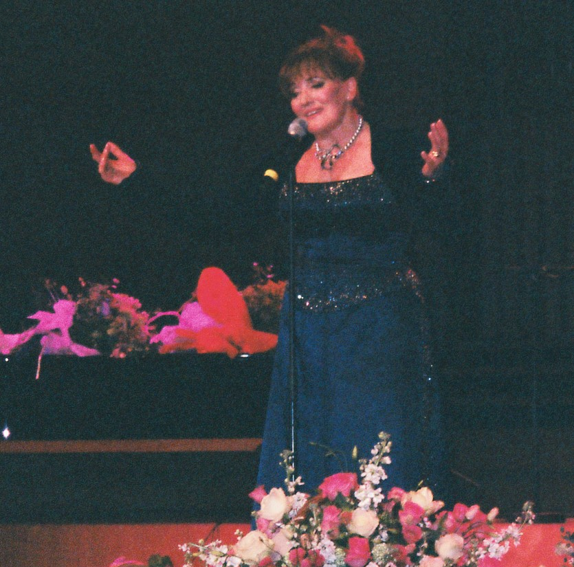 Tereza Kesovija at the concert "Olympia u Lisinskom" in Zagreb.